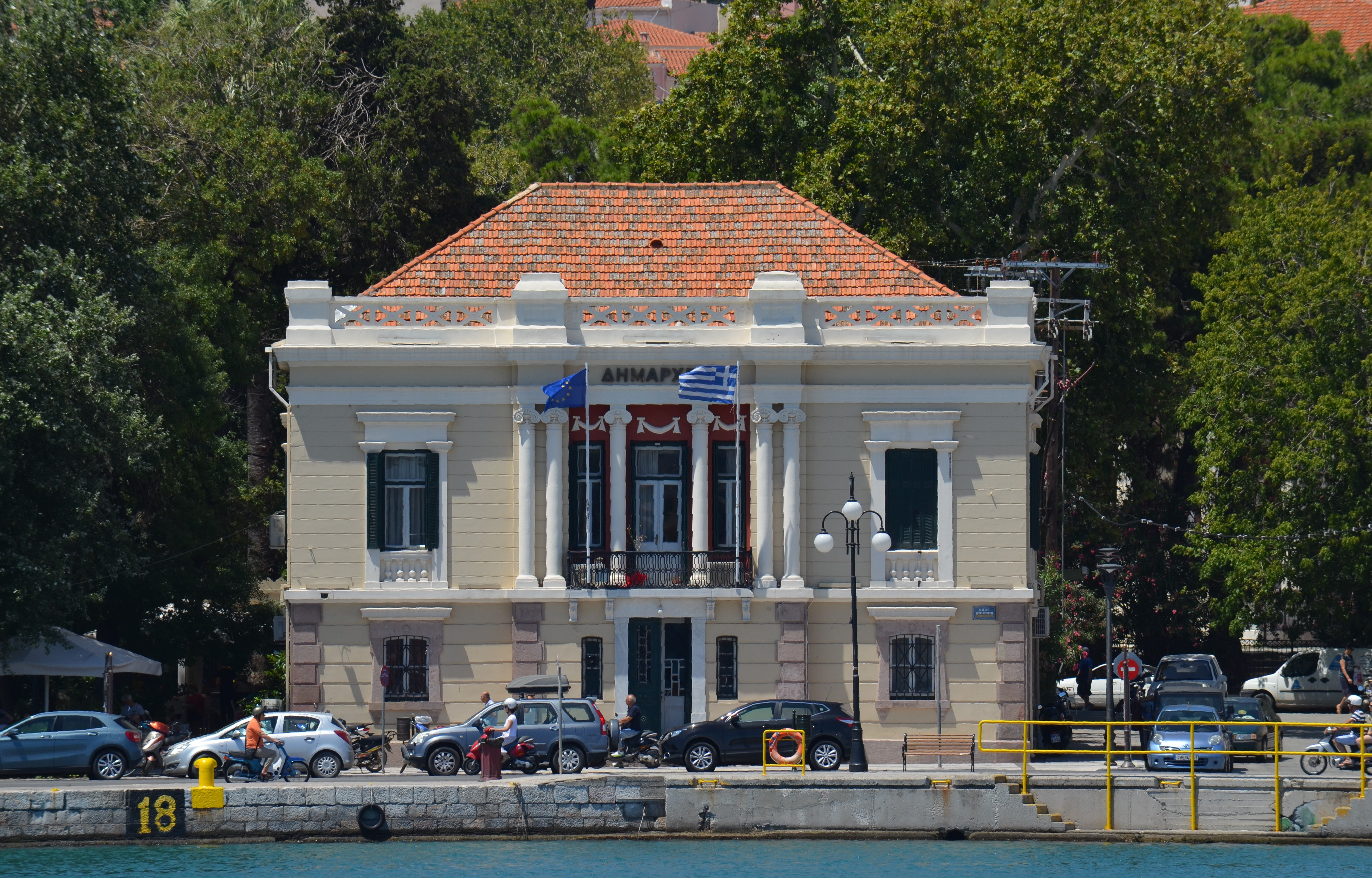 Das Rathaus von Mytilini an der P. Kountourioti an der Promenade.